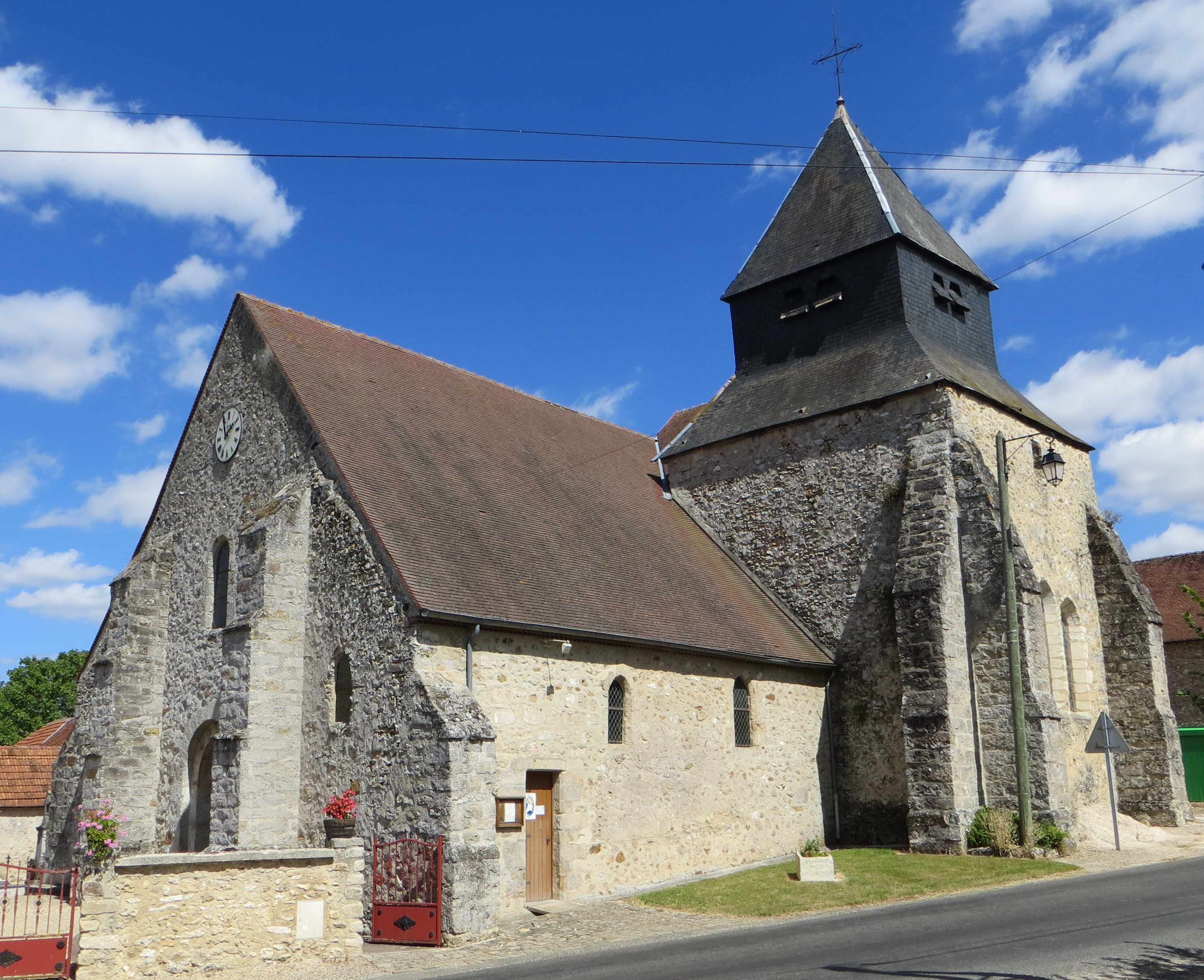 Vue générale de l'église